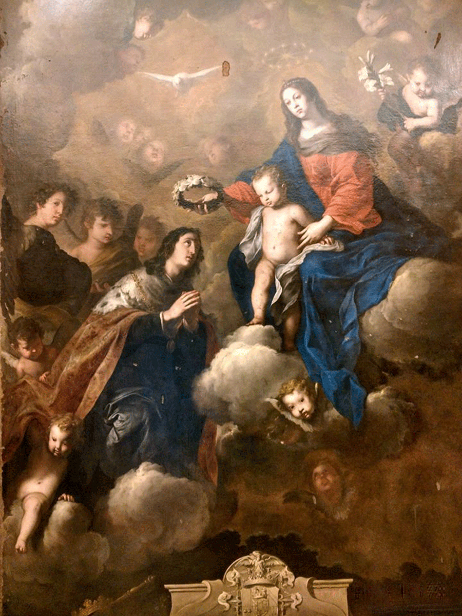 Беларуская (тарашкевіца): Сьвяты Казімер (Kazimier). Каранацыя